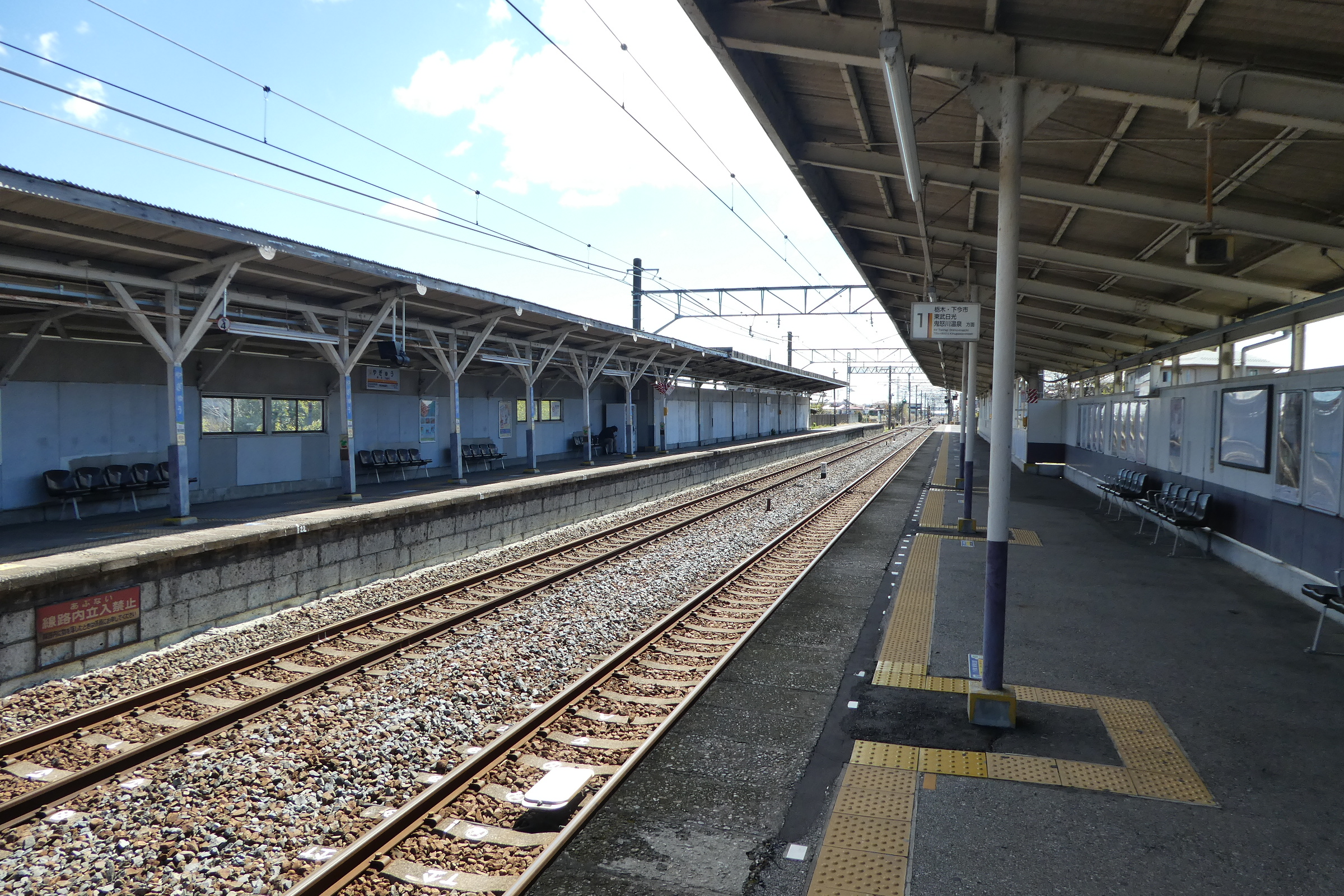 東武鉄道日光線 柳生駅 プラットホーム